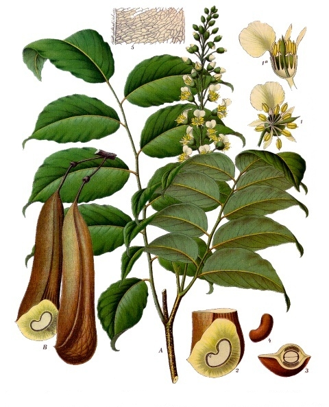 Perubalsambaum. A blühender Zweig, nat. Grösse; B Fruchthülsen, desgl., die eine geöffnet, um den Samen zu zeigen; 1 Blüthe, vergrössert; 1a dieselbe im Längsschnitt, desgl.; 2 unterer Theil der Fruchthülse, geöffnet, nat. Grösse; 3 Querschnitt der Hülse, desgl.; 4 Same, desgl.; 5 ein Theil der Blattfläche, vergrössert.